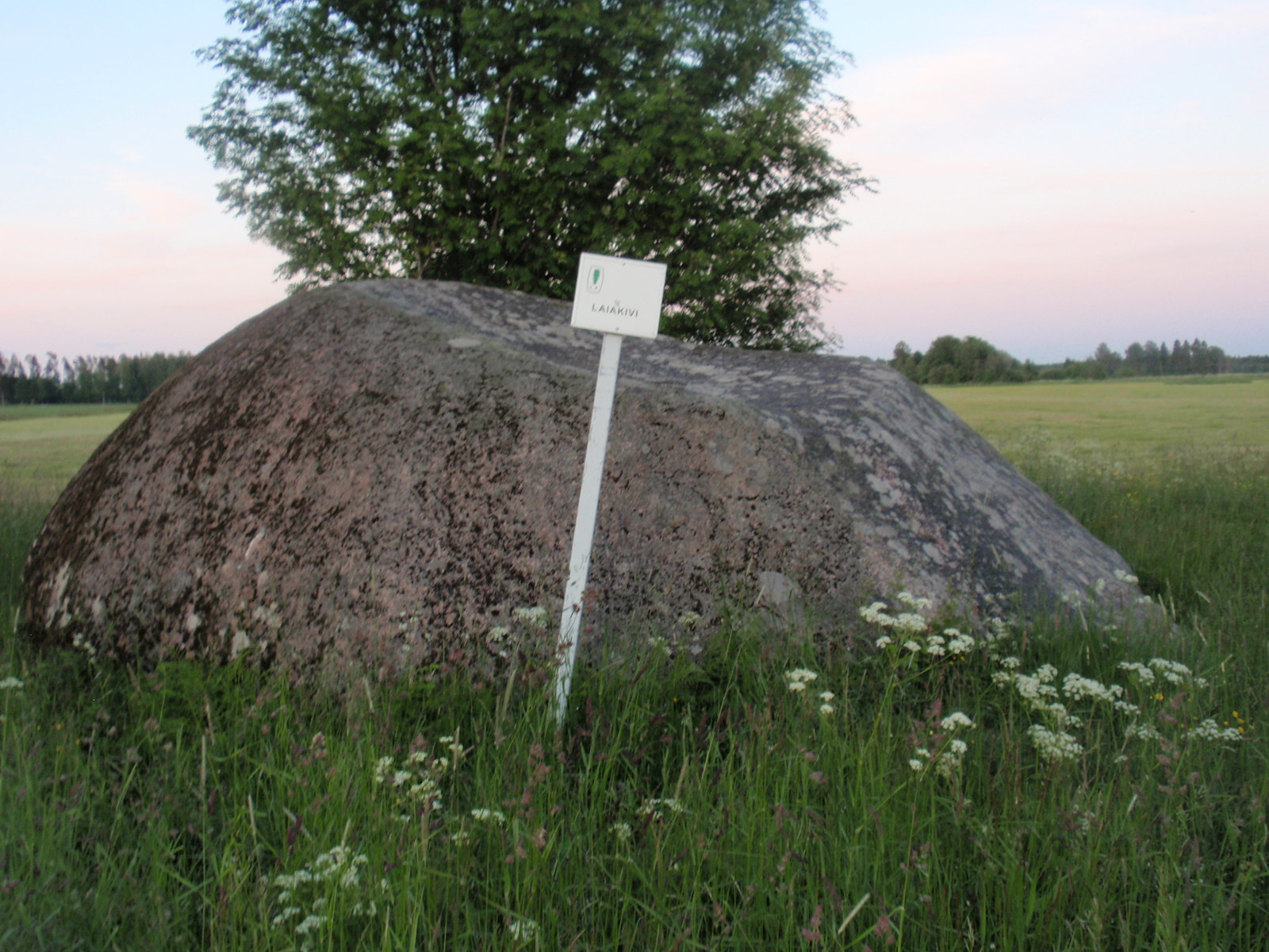 Kõpu laiakivi